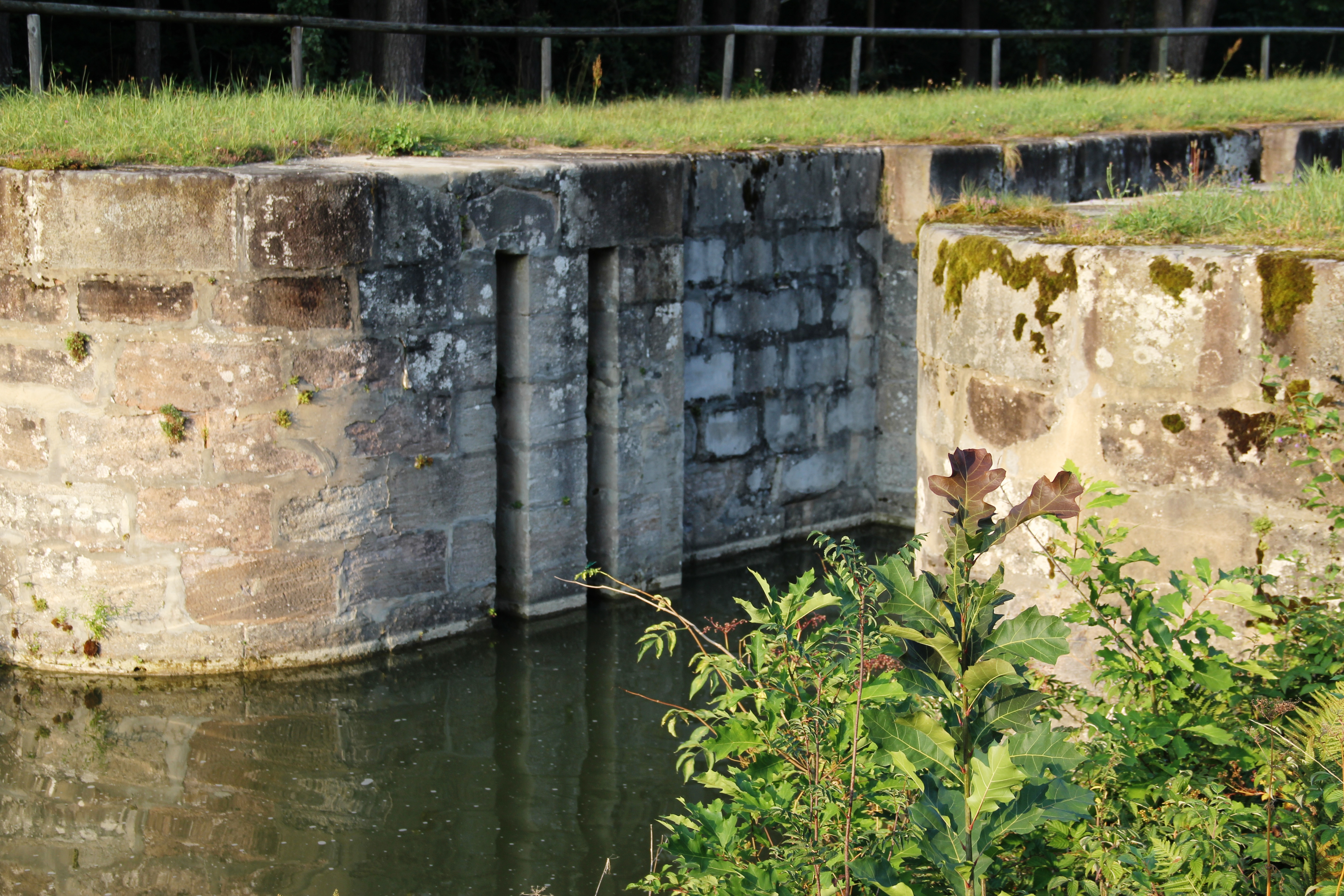 Ludwig-Donau-Main-Kanal, Schleuse 56